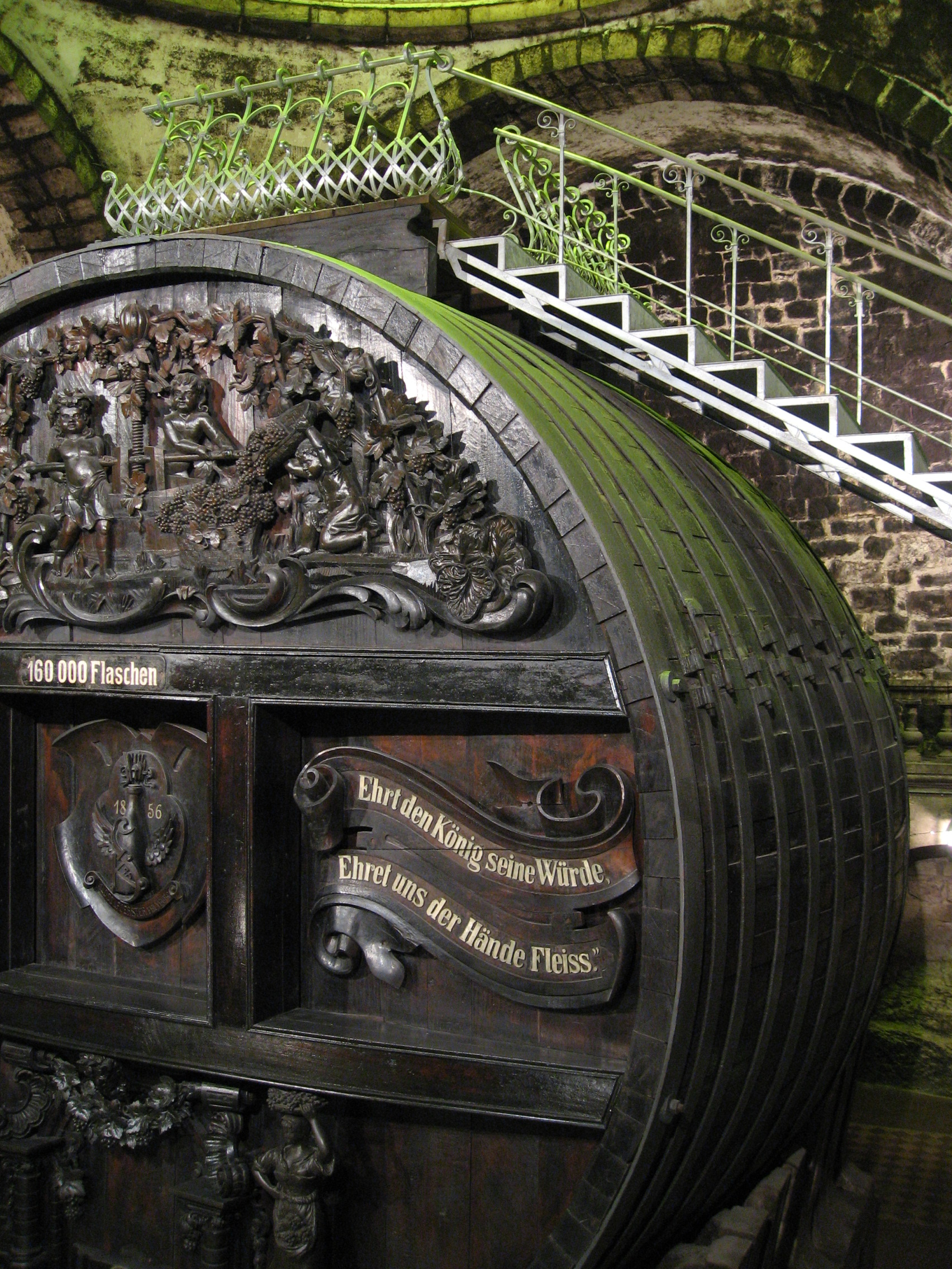 Rotkäppchen Sektkellerei Freyburg (Unstrut), größtes Cuvéefass Deutschlands